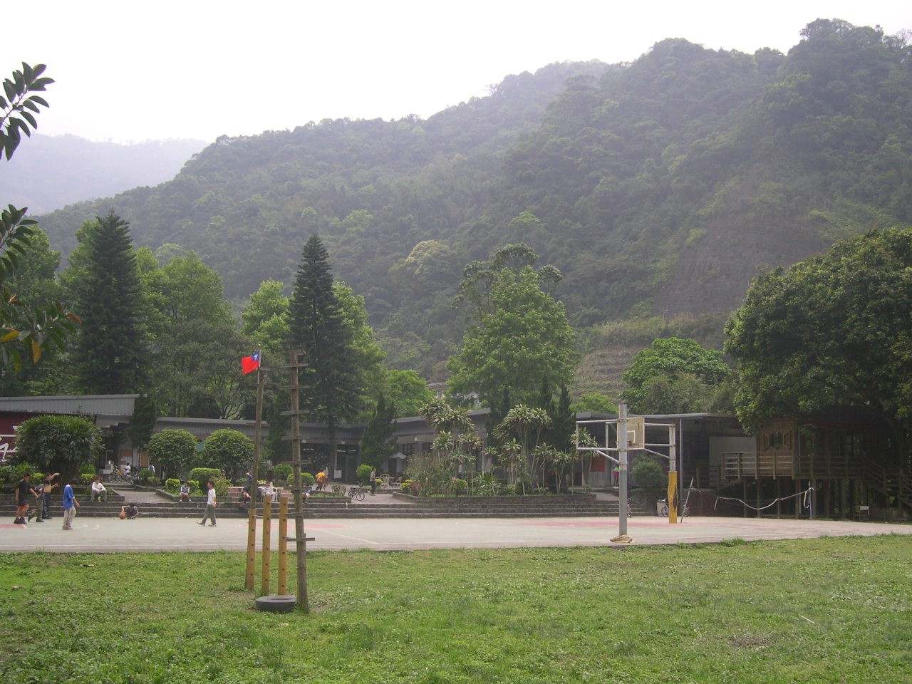 臺北縣烏來鄉信賢村種籽親子實驗小學球場